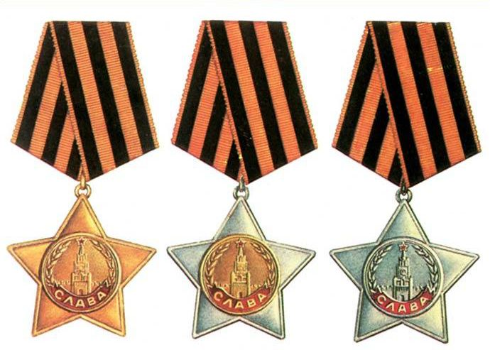 Ордена Славы I, II и III степени